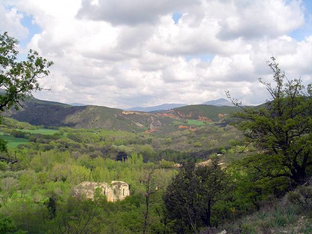 Vista del Monasterio cisterciense de Bonaval en Retiendas